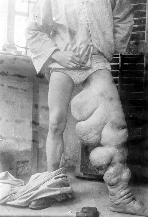 Repronegatief. Een patiënt met een zogenaamd olifantsbeen, veroorzaakt door de ziekte Elephantiasis, voor een operatie